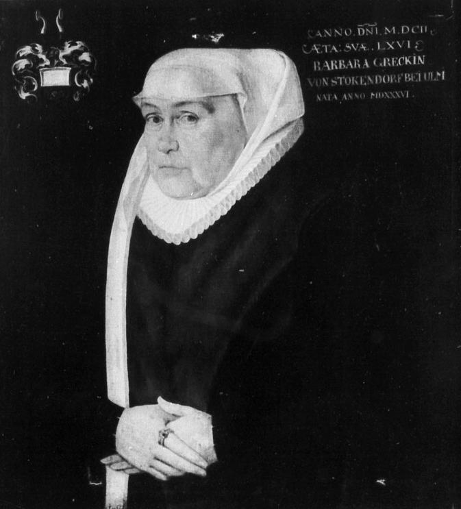 Barbara Eberz geb. Greck von Kochendorf, ihres Alters 66 Jahre, dat. 1602, Öl/lwd., 68 x 65 cm, Spital Isny im Allgäu